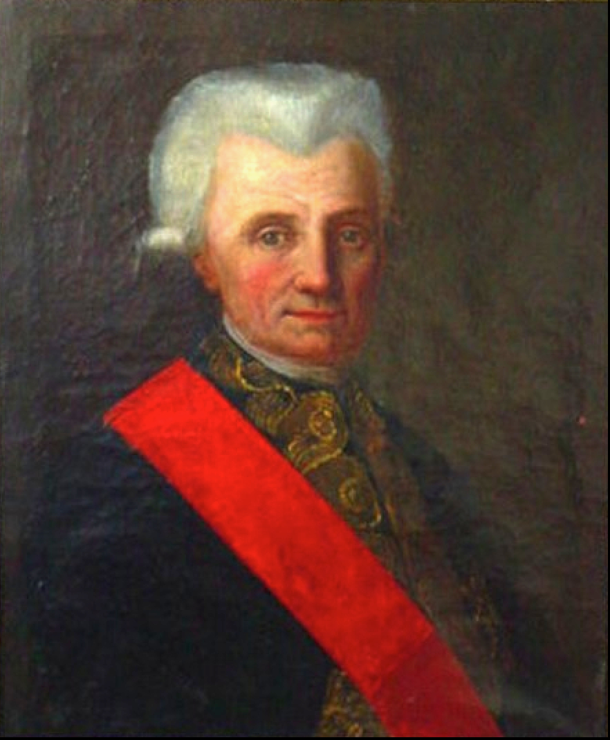 Alexis Charles de Magallon, comte de la Morlière, seigneur de Mardick (1707-1799)